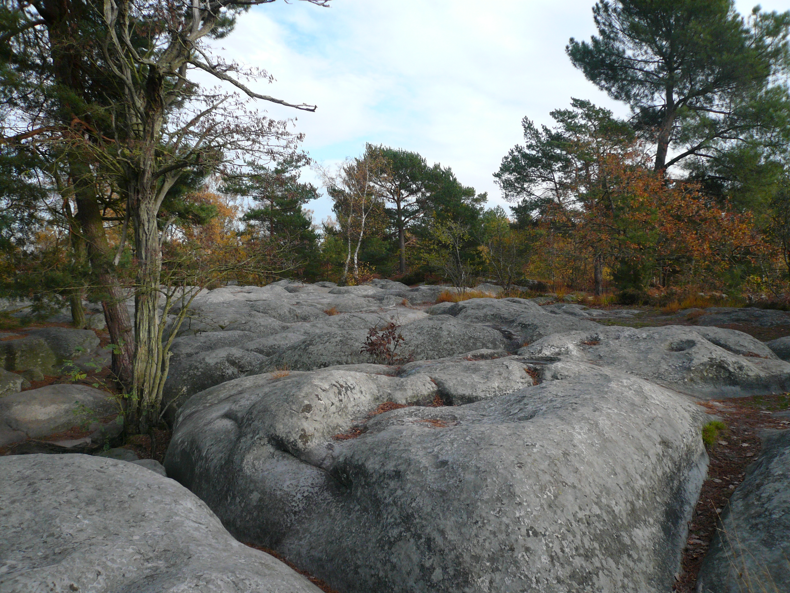 Platière d'Apremont dans la Forêt de Fontainebleau en Seine-et-Marne, France. Phénomène d'érosion du grès.